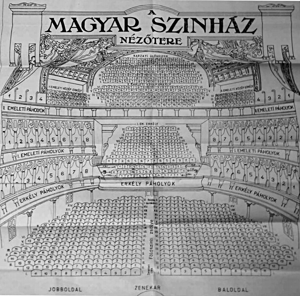 A Magyar Színház nézőtere az 1914-es átépítés után